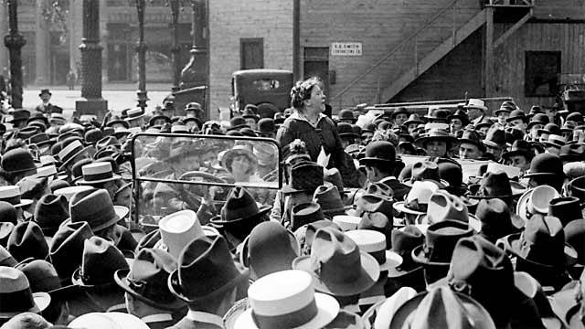 Emma Goldman addressing a rally at Union Square, New York, 1916.